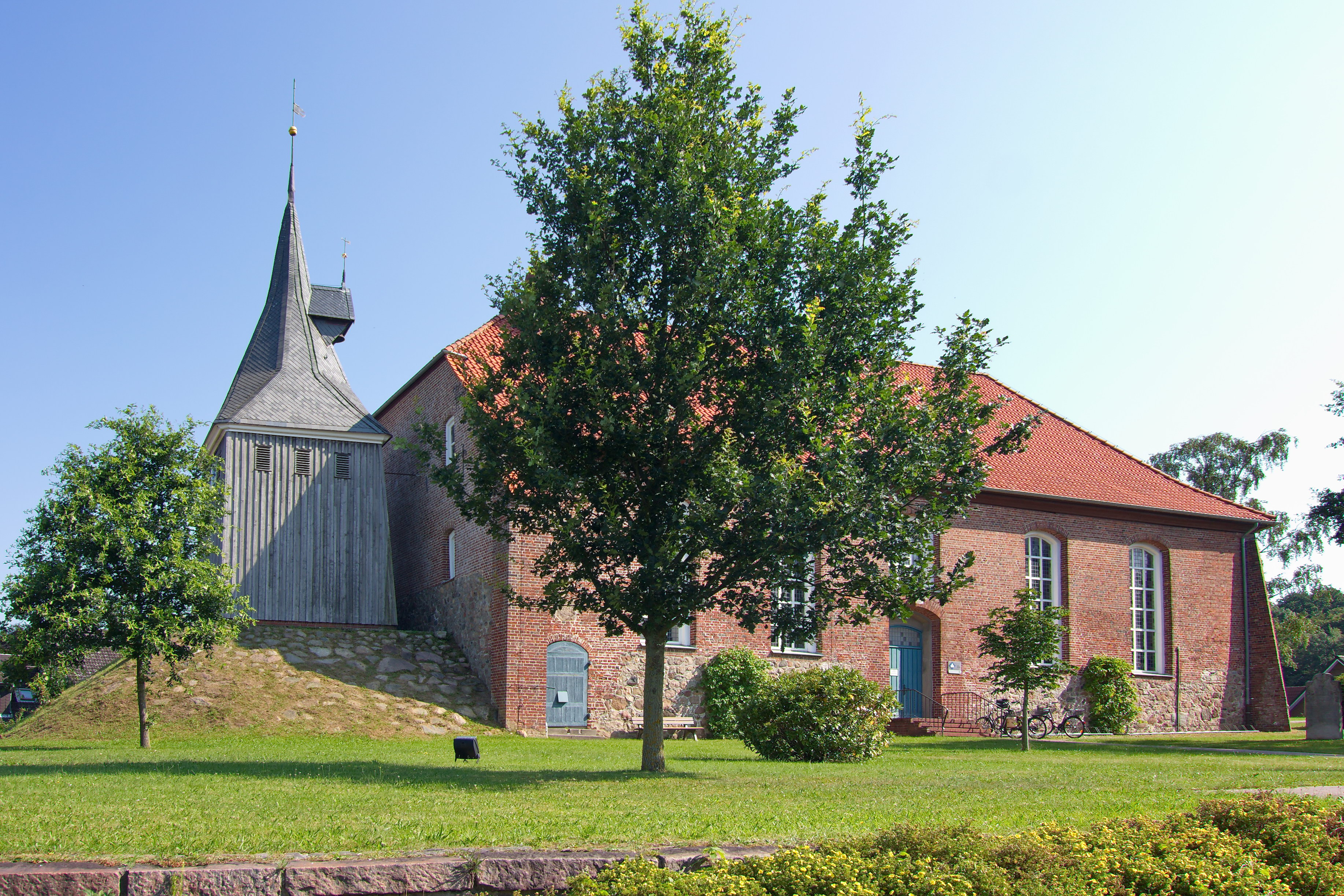 St. Nicolai-Kirche Cadenberge, Niedersachsen, Deutschland von 1752